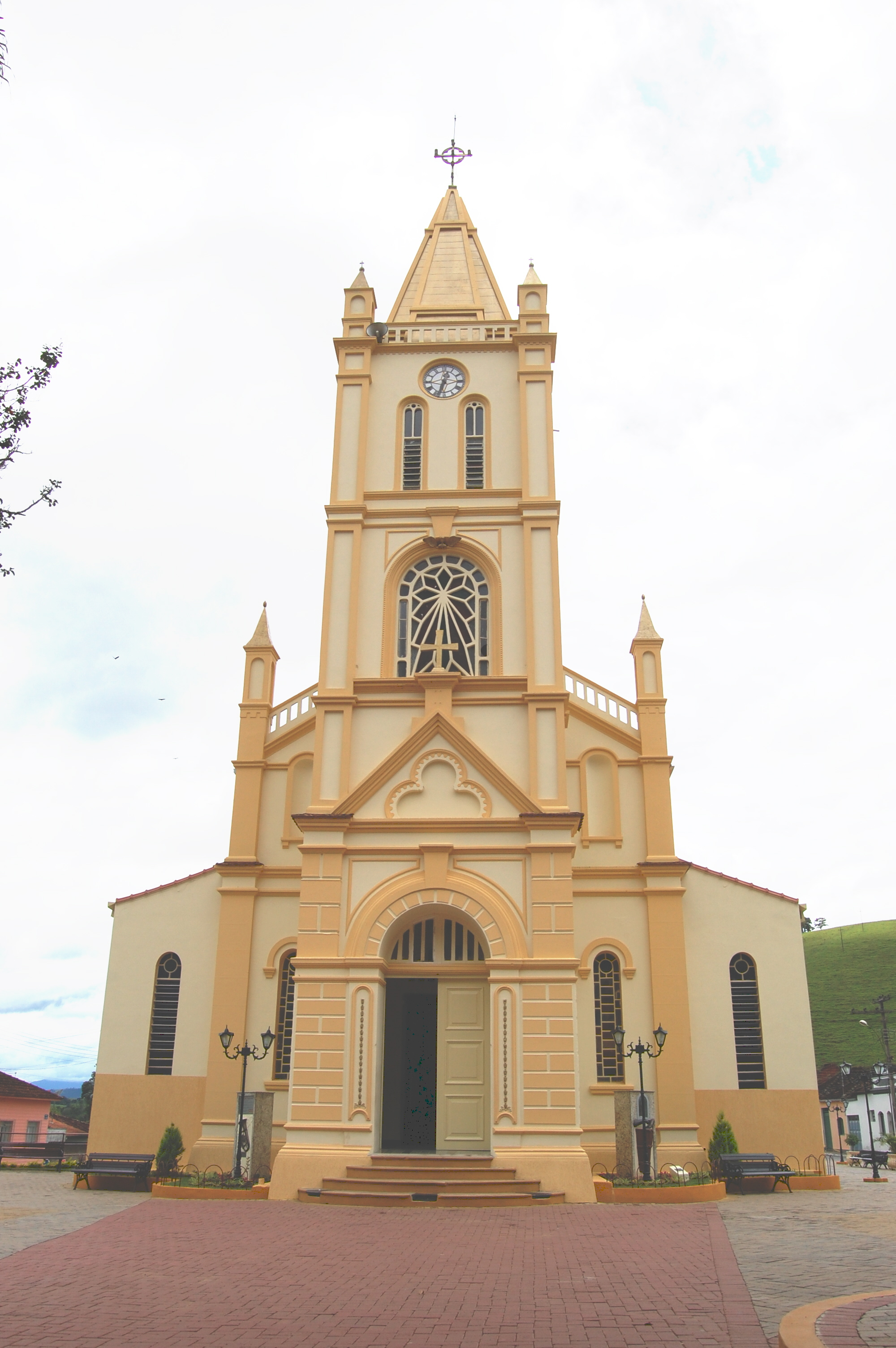 A Igreja Matriz Santa Isabel e São Benedito em Piranguinho, Minas Gerais, Brasil. A igreja localiza-se na praça Coronel Brás e foi construída em 1945..